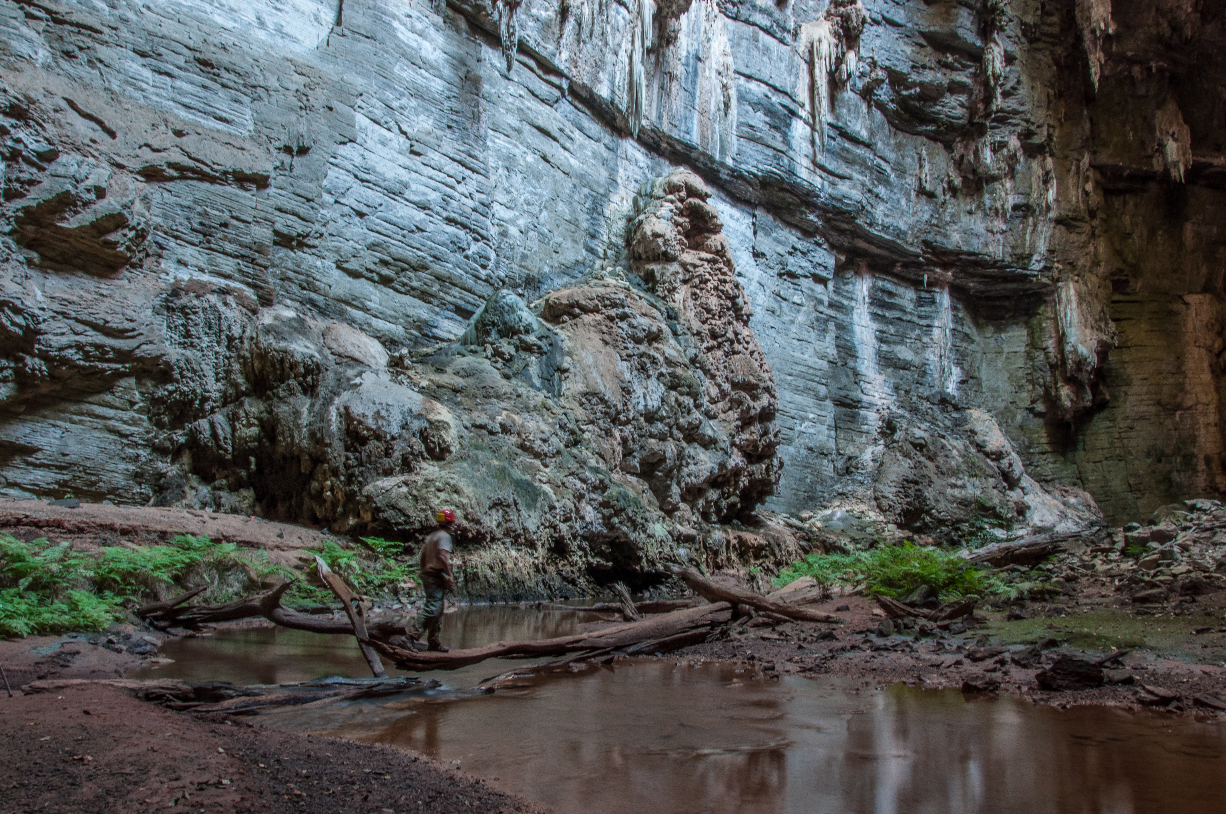 Travessia do rio Peruaçu, Gruta do Janelão, Parque Nacional Cavernas do Peruaçu